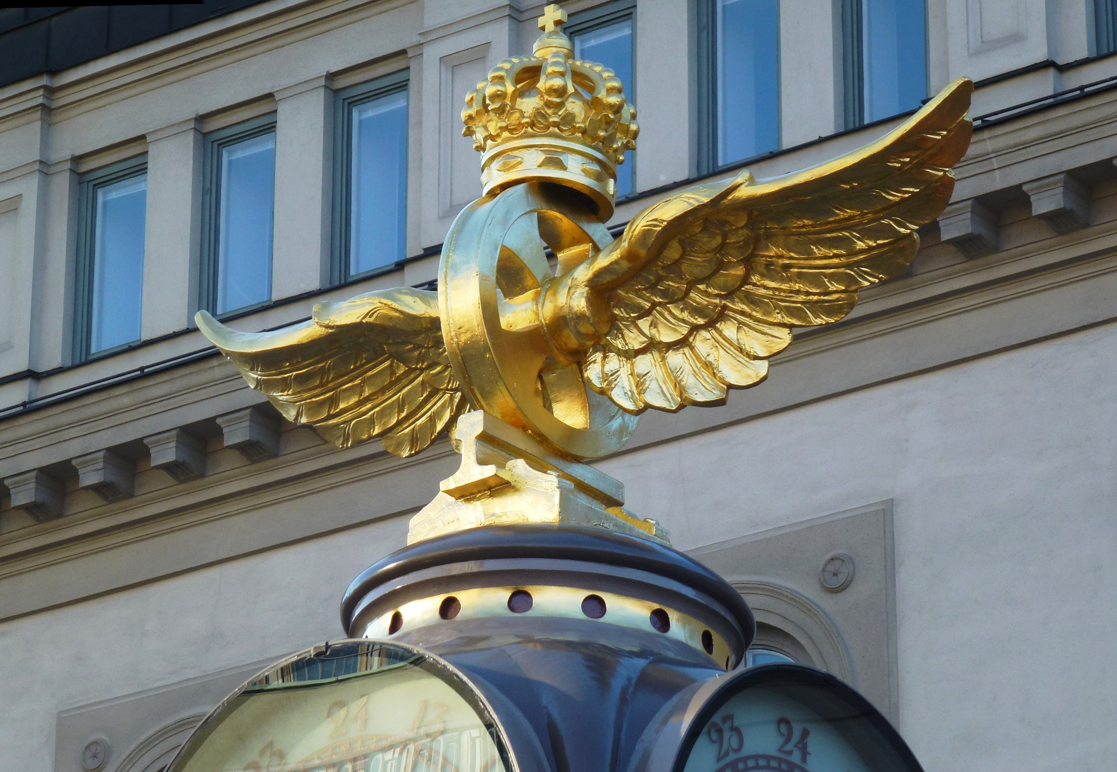 Tornbergs ur efter renoveringen på Centralplan i Stockholm